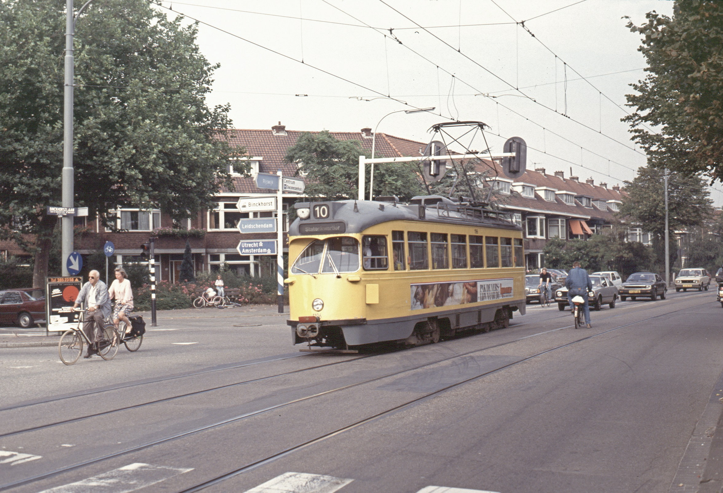 PCC in Den Haag